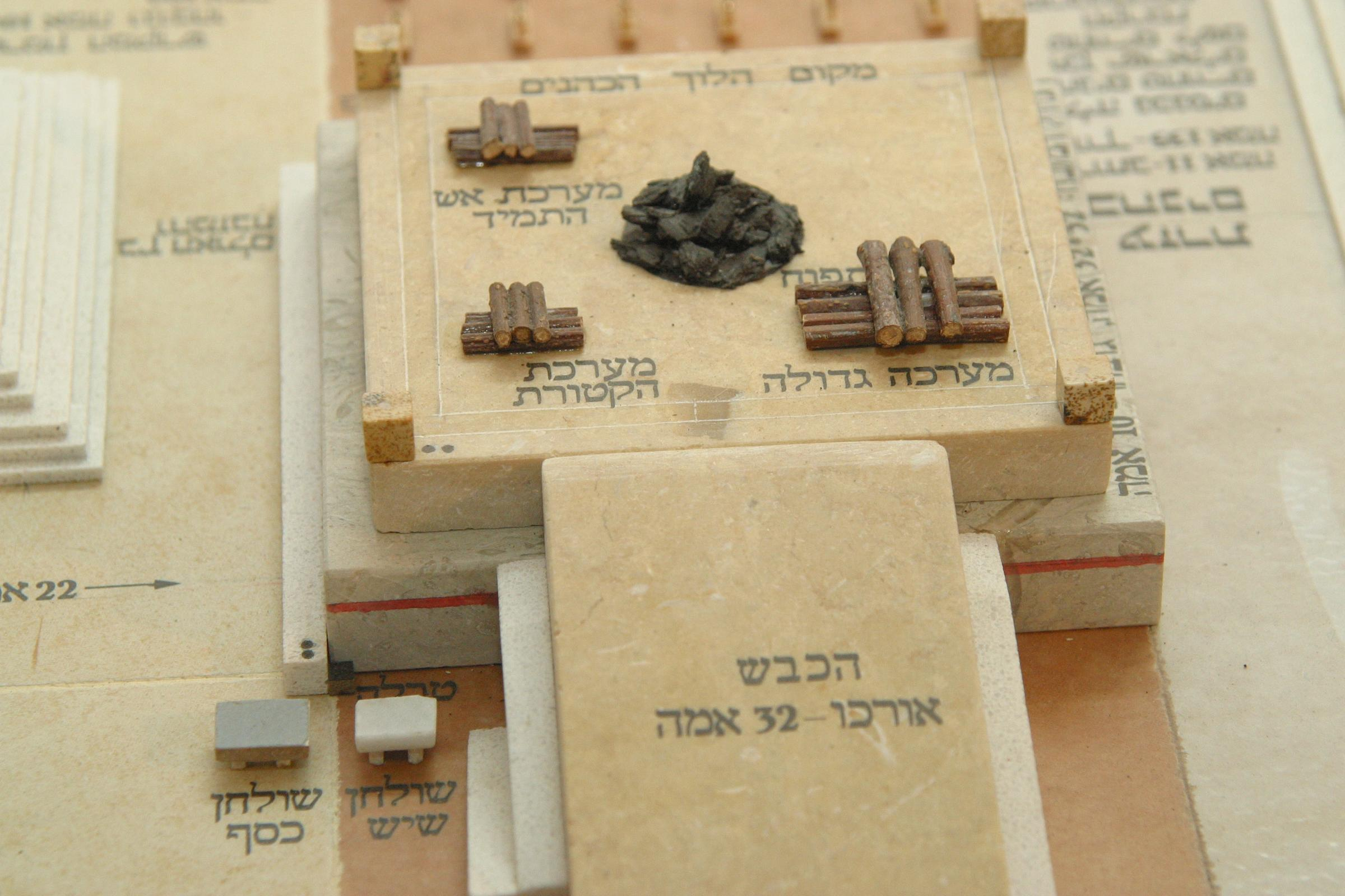 דגם משכן העדות שנוצר על ידי מיכאל אוסניס מקדומים